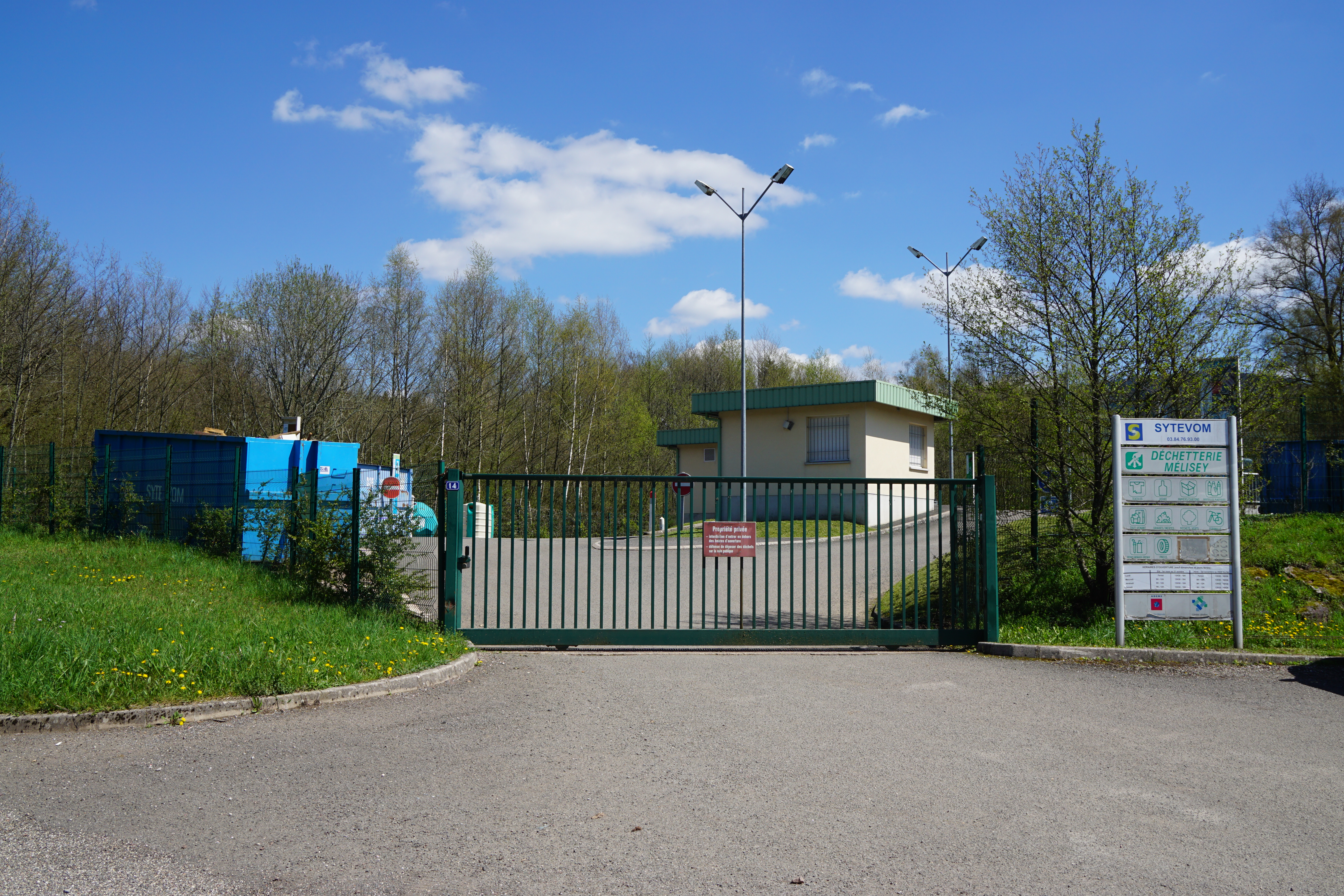 La décheterie de Mélisey.